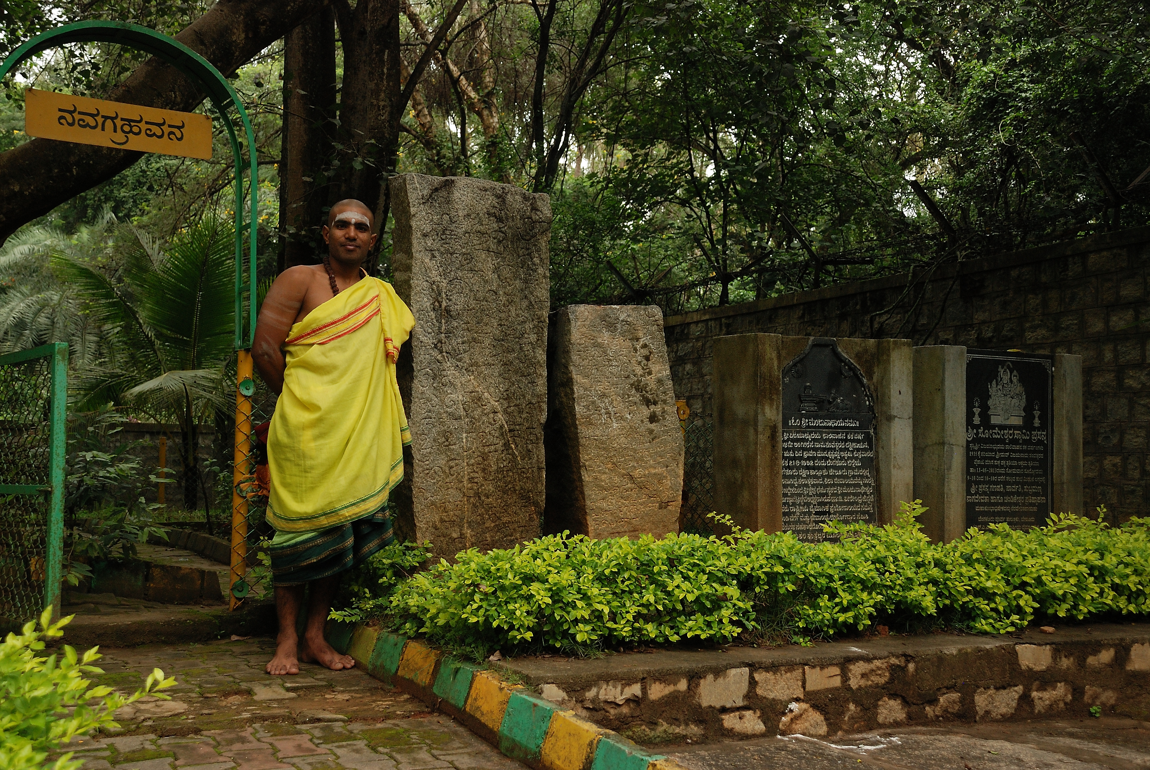 ಕನ್ನಡ: Belur